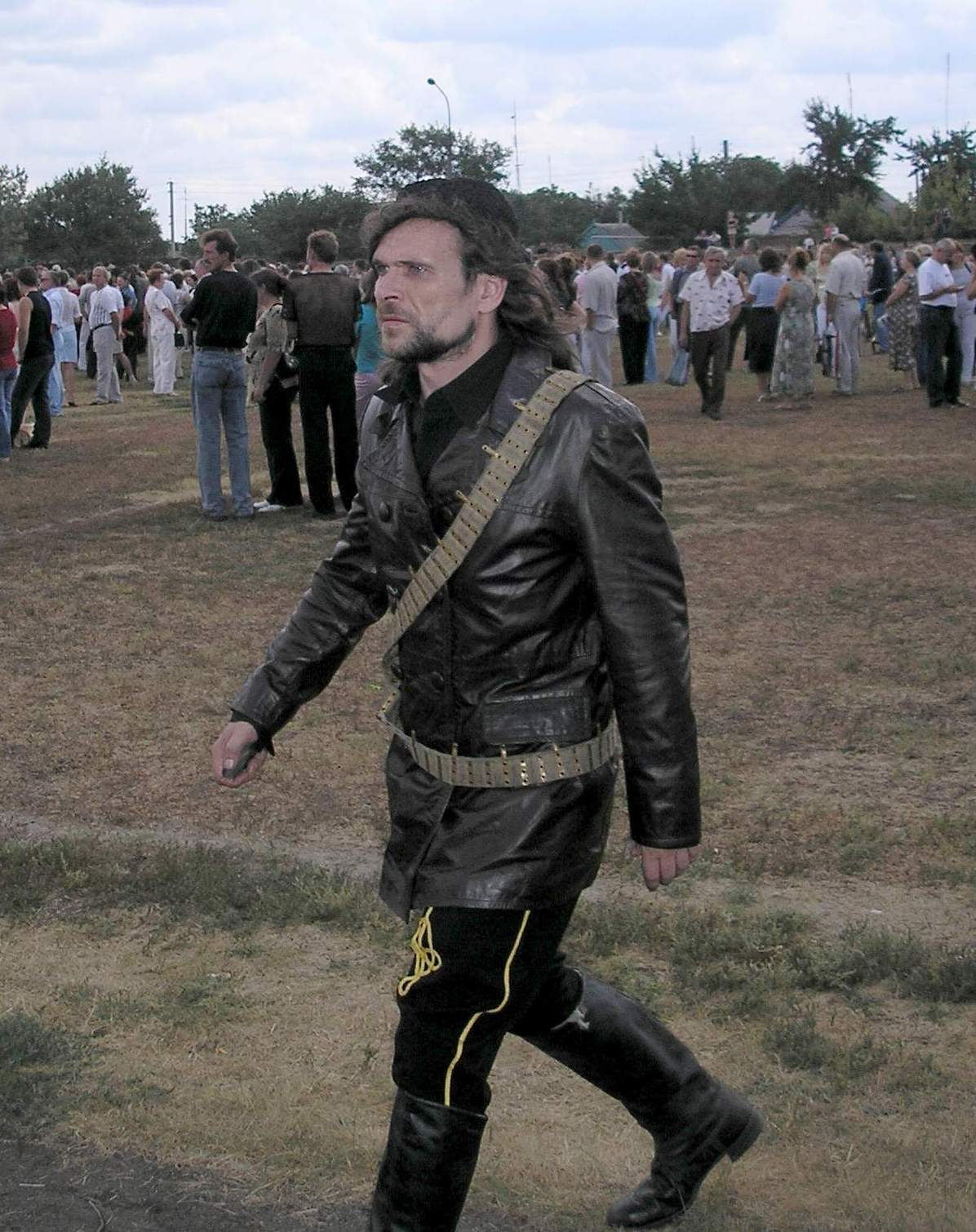 Олесь Лук'яненко, український письменник на фестивалі у м. Гуляй-Поле. 24 серпня, 2006.